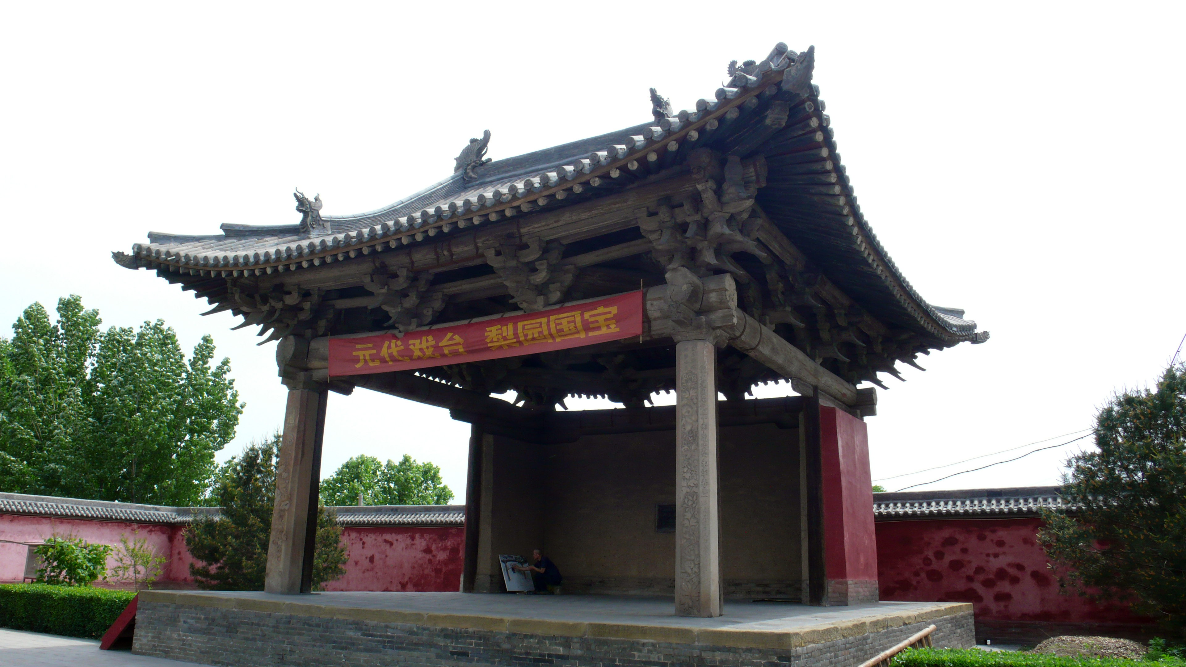 中文（中国大陆）: 牛王庙戏台。